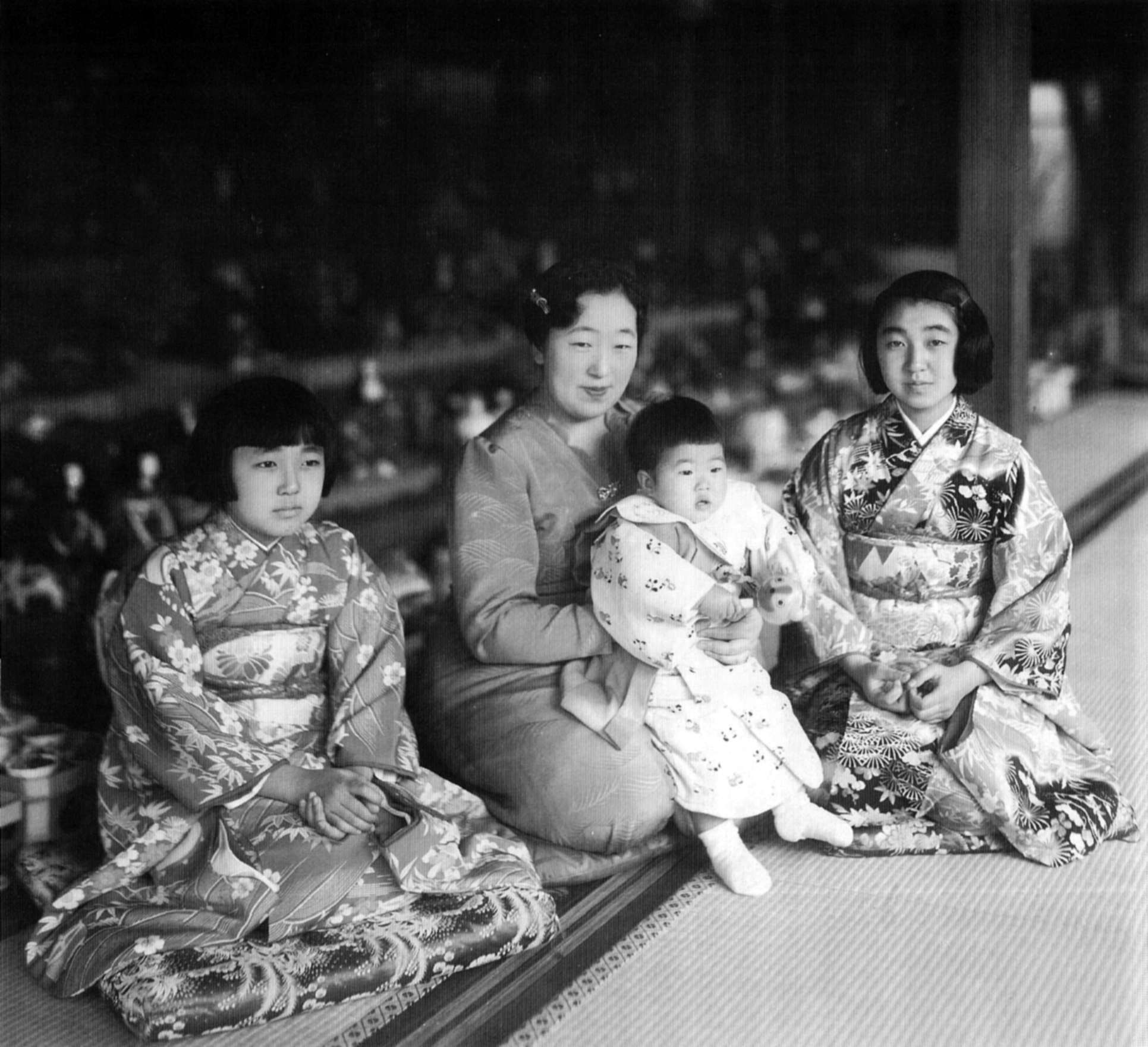 ひな祭り(Hina Fesitival)を祝う、香淳皇后(Empress Kōjun)と皇女たち。皇后が抱いているのは、清宮貴子内親王(Suga-no-miya Takako)